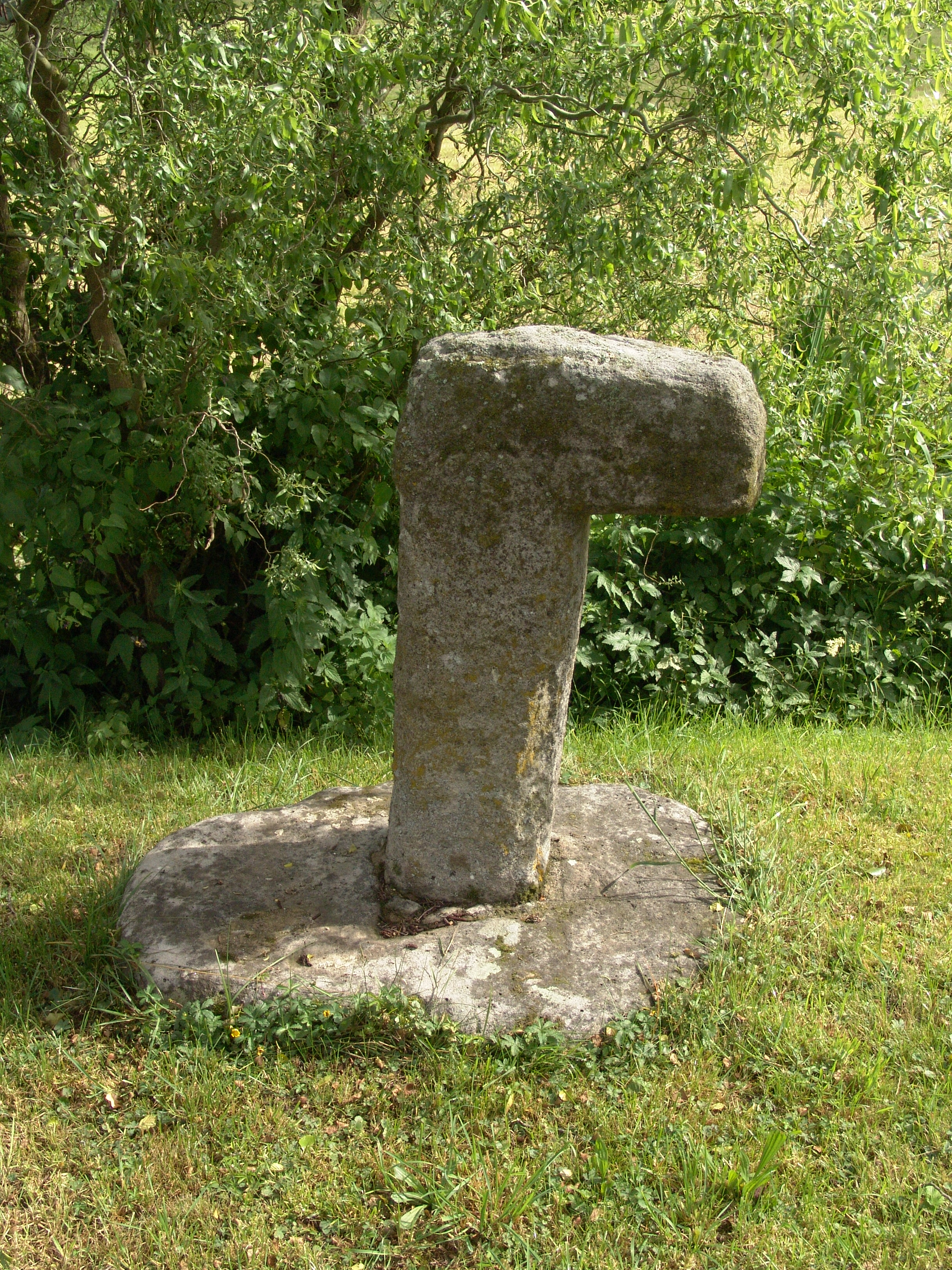 Steinkreuz vor der Kirche Zu unserer lieben Frau in Hagenau